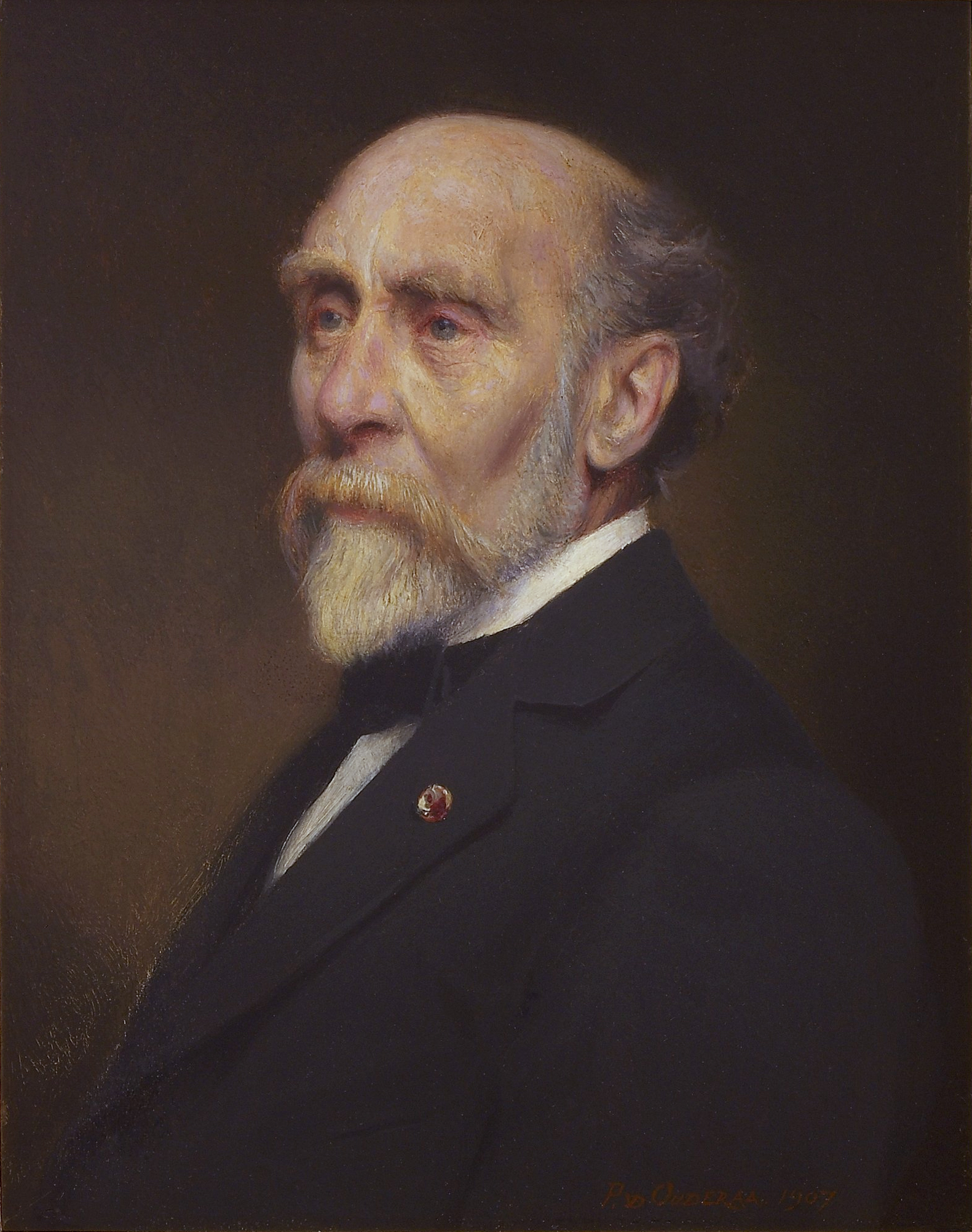 J. Schaeps, lid-conservator van de Besturende Commissie van Steen en Vleeshuis olieverf op hout 500 x 447 mm. 1907